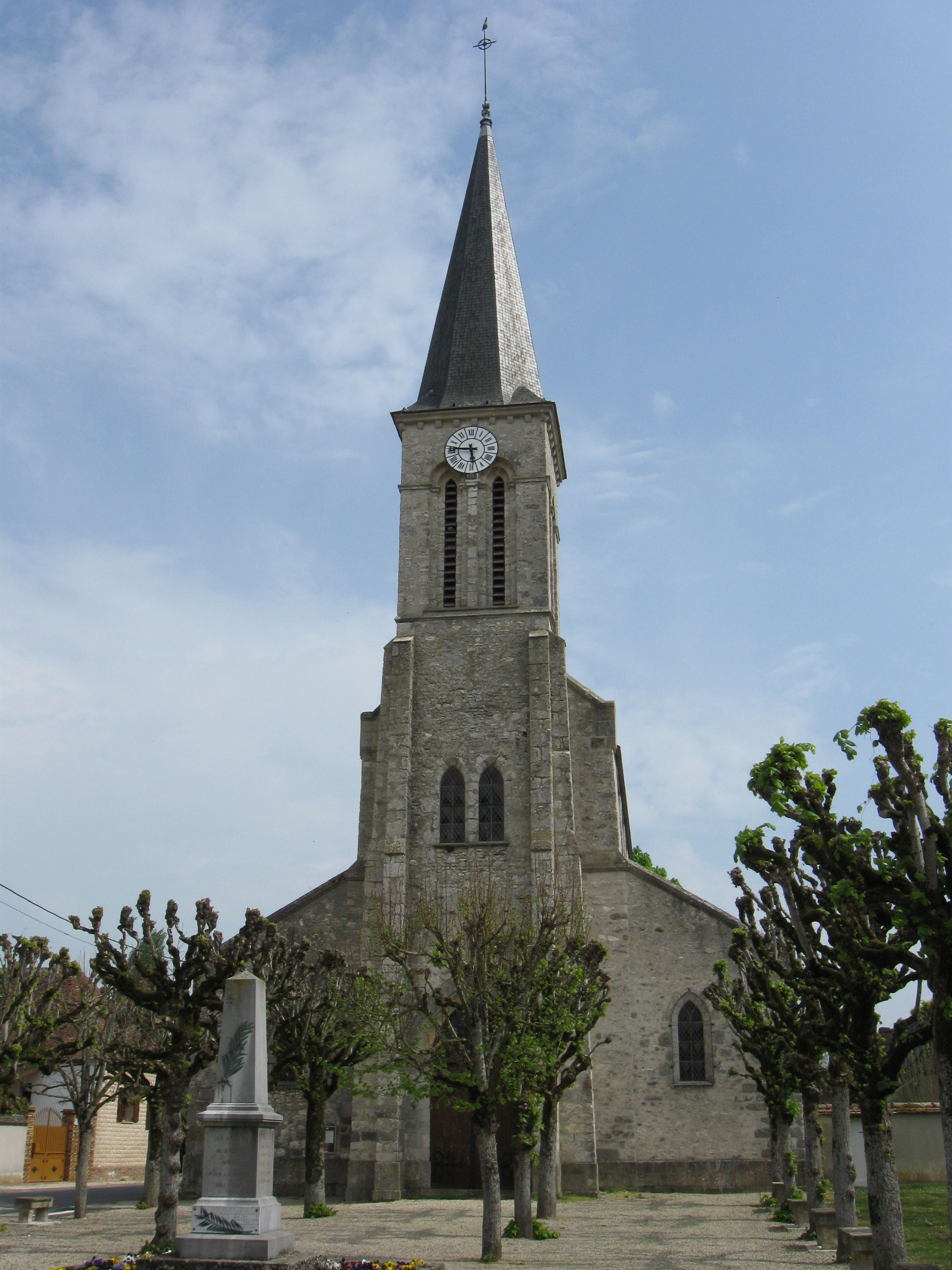 Église Saint-Héracle de Balloy. (Seine-et-Marne, région Île-de-France).